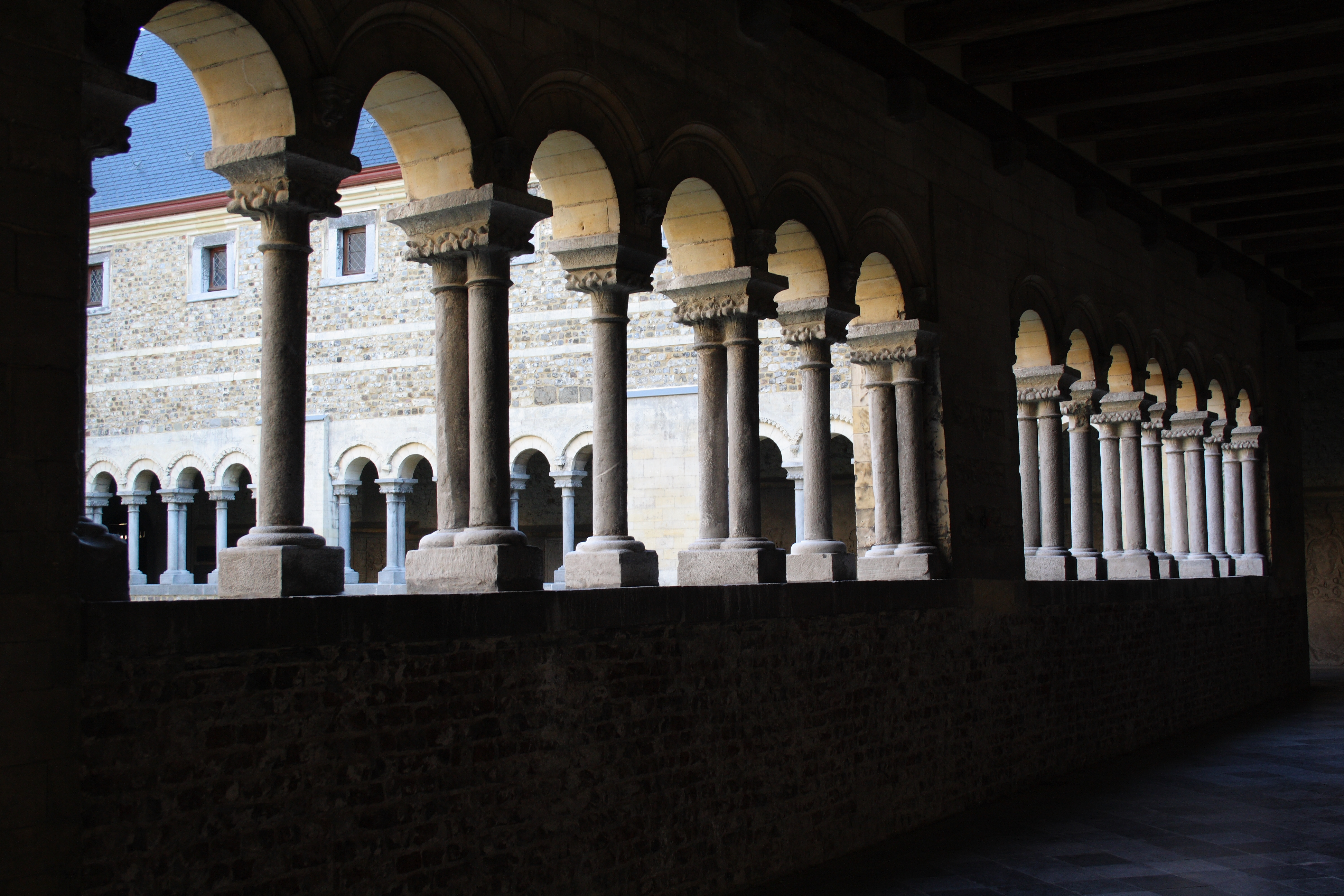 Kreuzgang der Liebfrauenbasilika in Tongeren in der Provinz Limburg (Belgien)